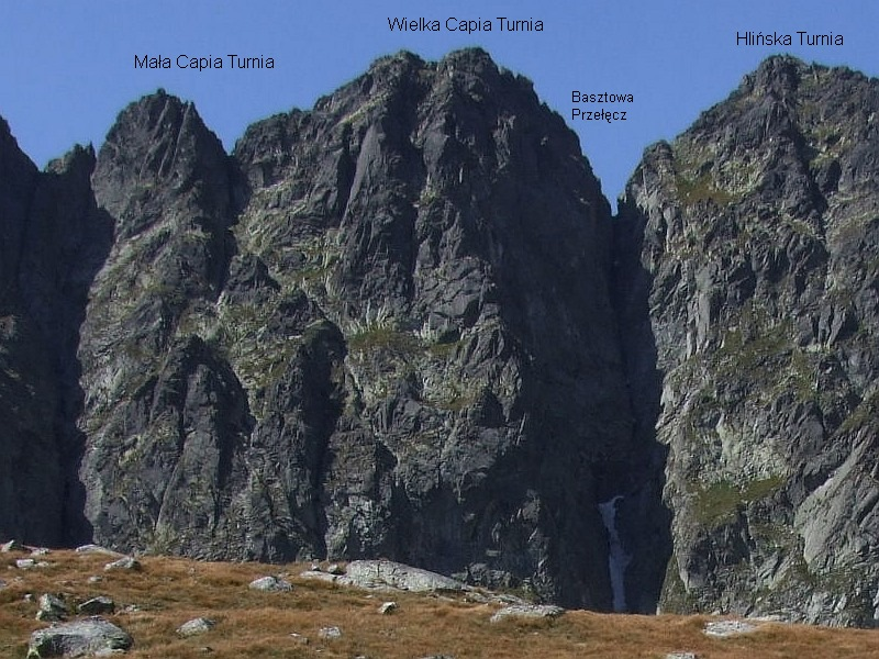 Capie Turni, Basztowa Przełęcz i Hlińska Turnia